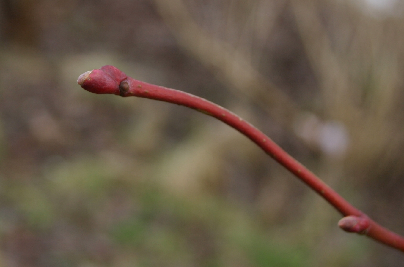 Tilia cordata: Buds